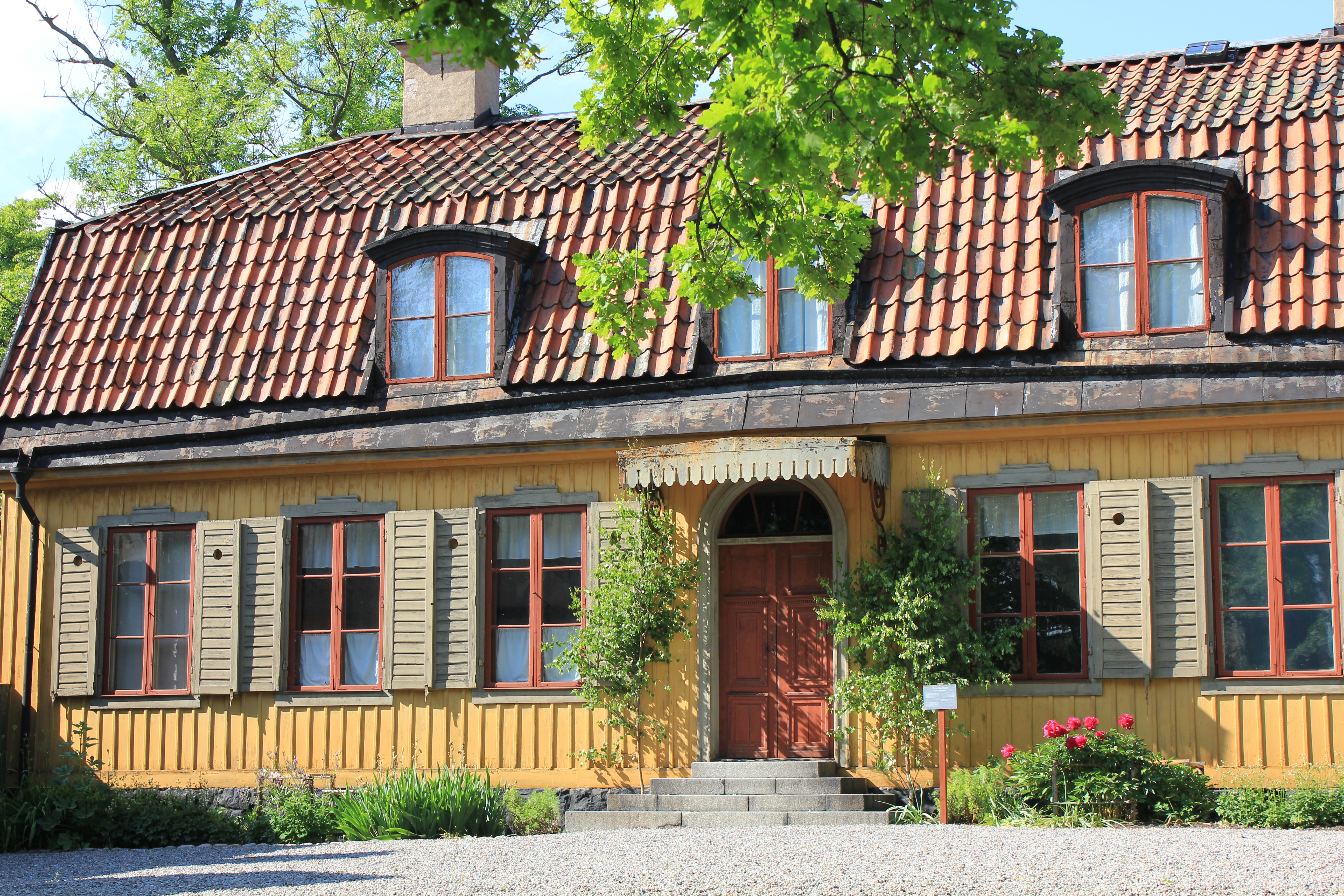 Hazeliushuset foran.